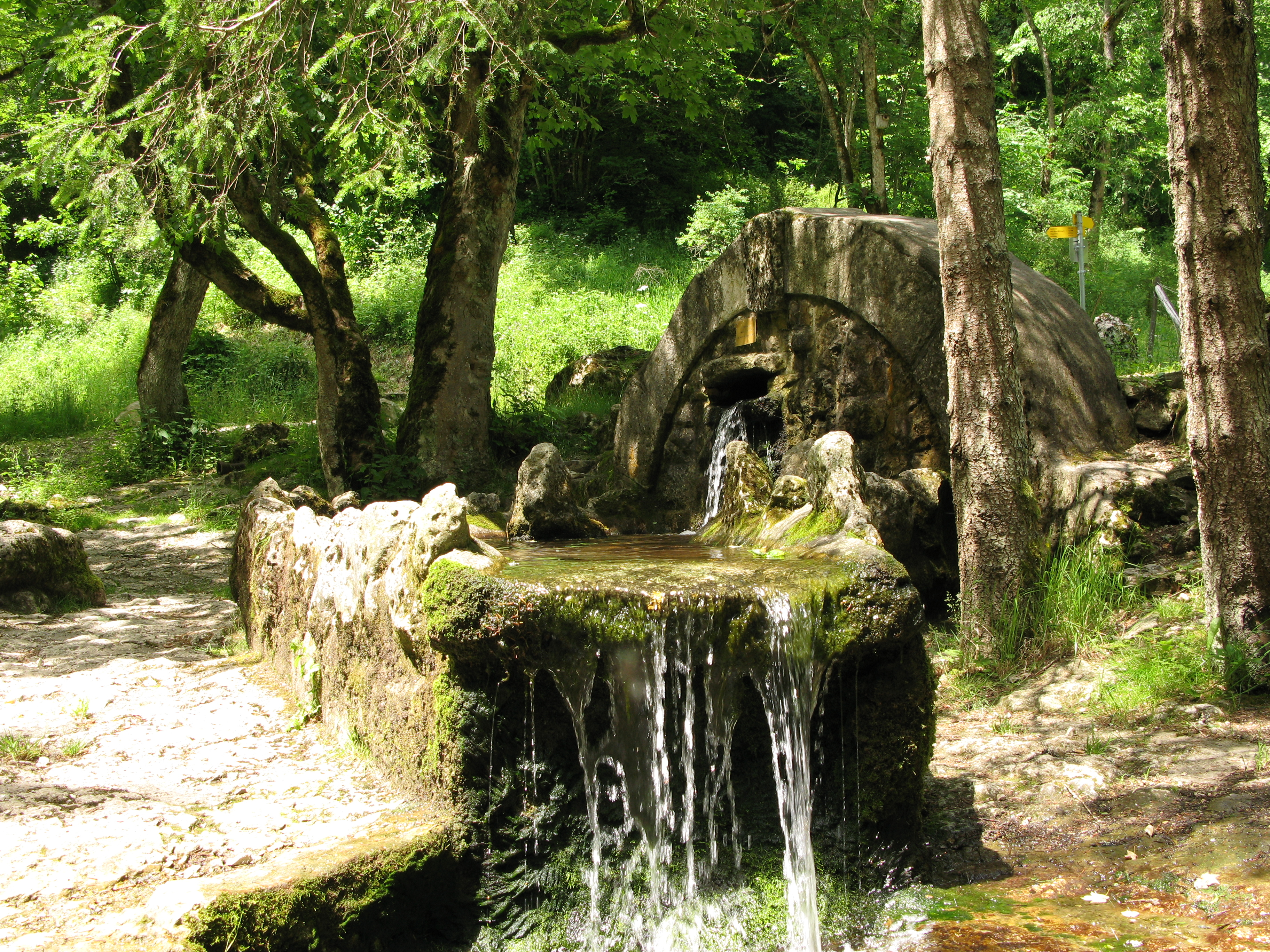 Der Schäfertalbrunnen im Schäfertal bei Böttingen auf dem Donauberglandweg auf der Schwäbischen Alb.